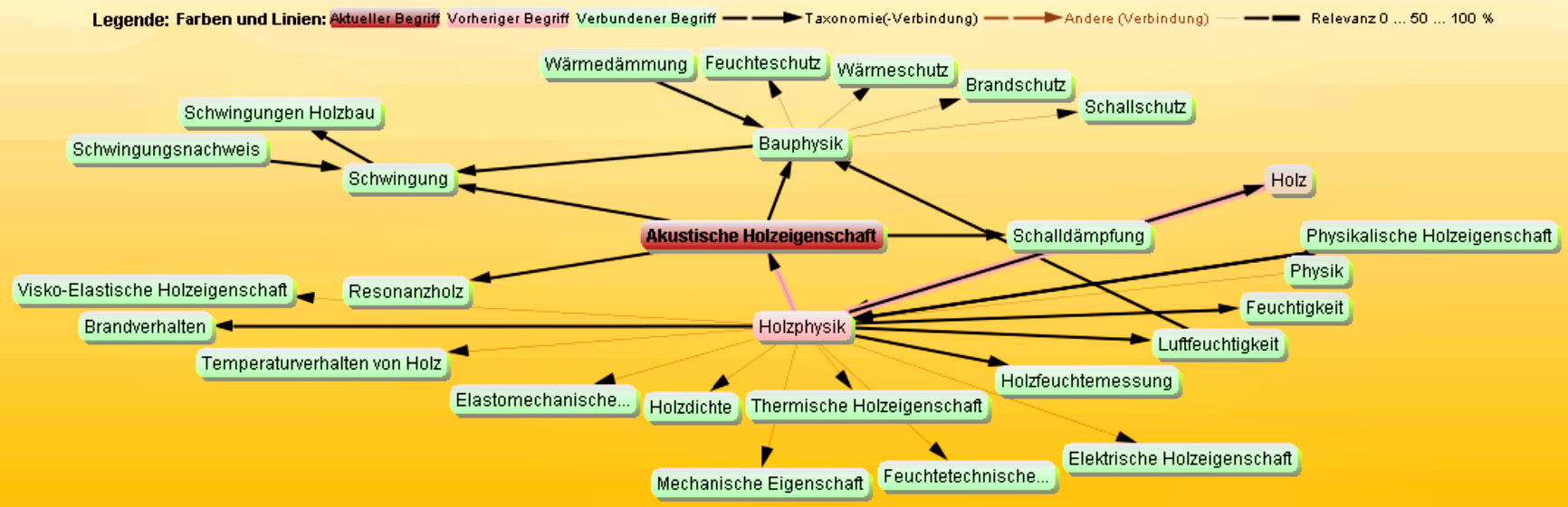 Sternbrowser als grafische Navigationshilfe